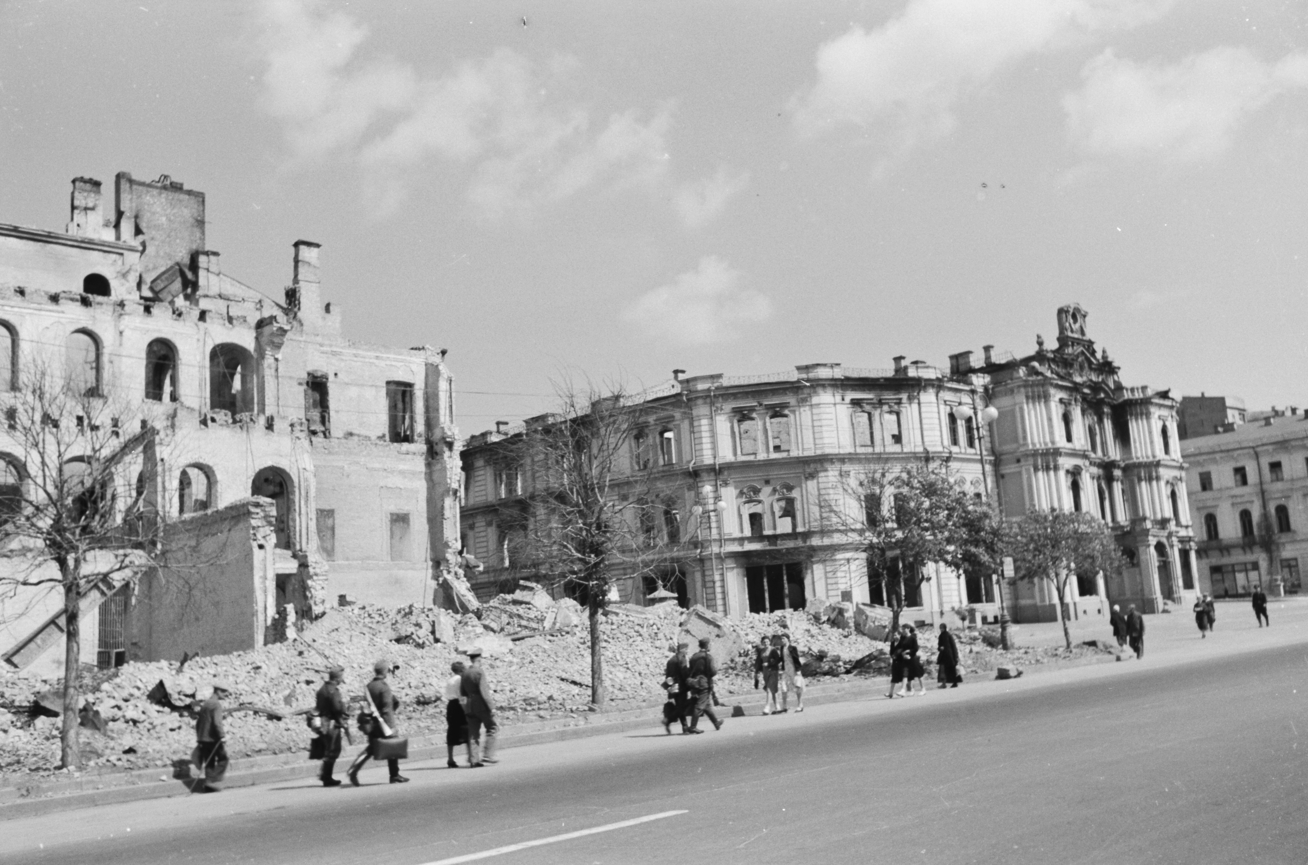 a Hrescsatik sugárút felrobbantott épületei, balra a Grand Hotel, szemben a városháza romjai. Location: Ukraine, Kiev Tags: damaged building, war damage, second World War Title: a Hrescsatik sugárút felrobbantott épületei, balra a Grand Hotel, szemben a városháza romjai.